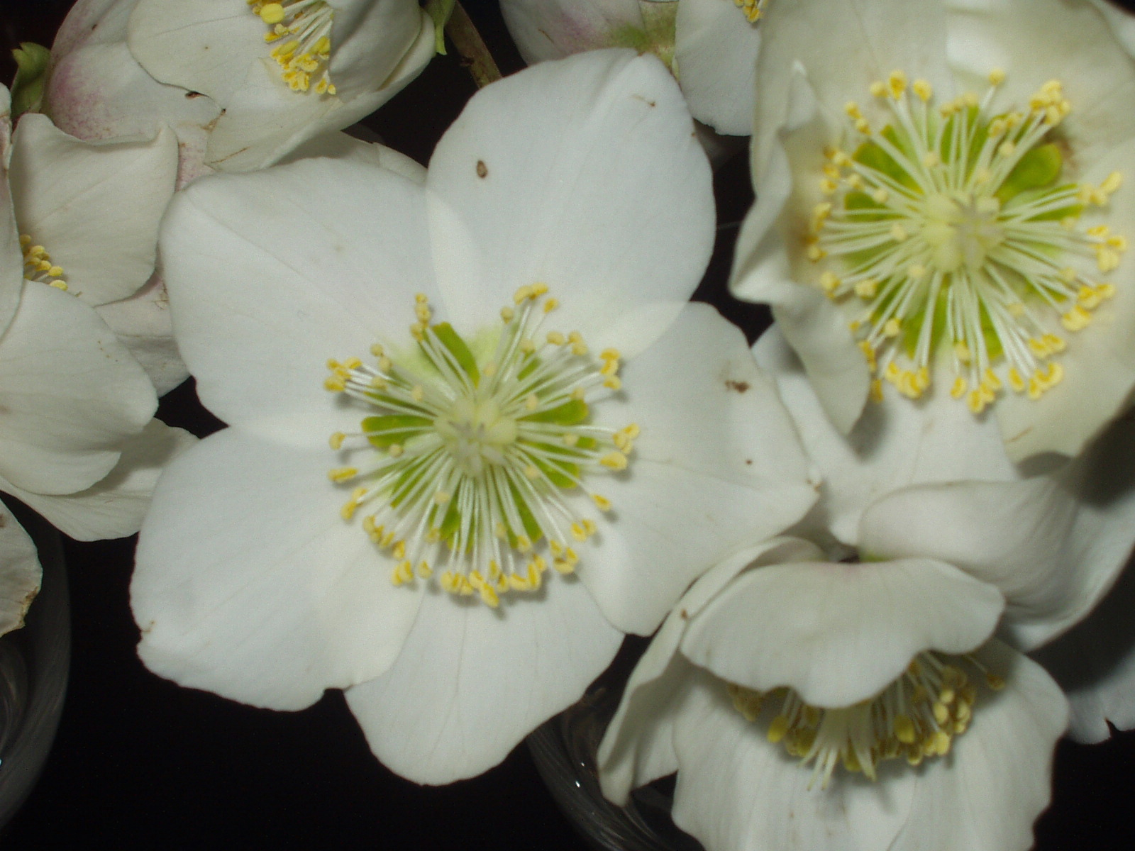 Helleborus niger